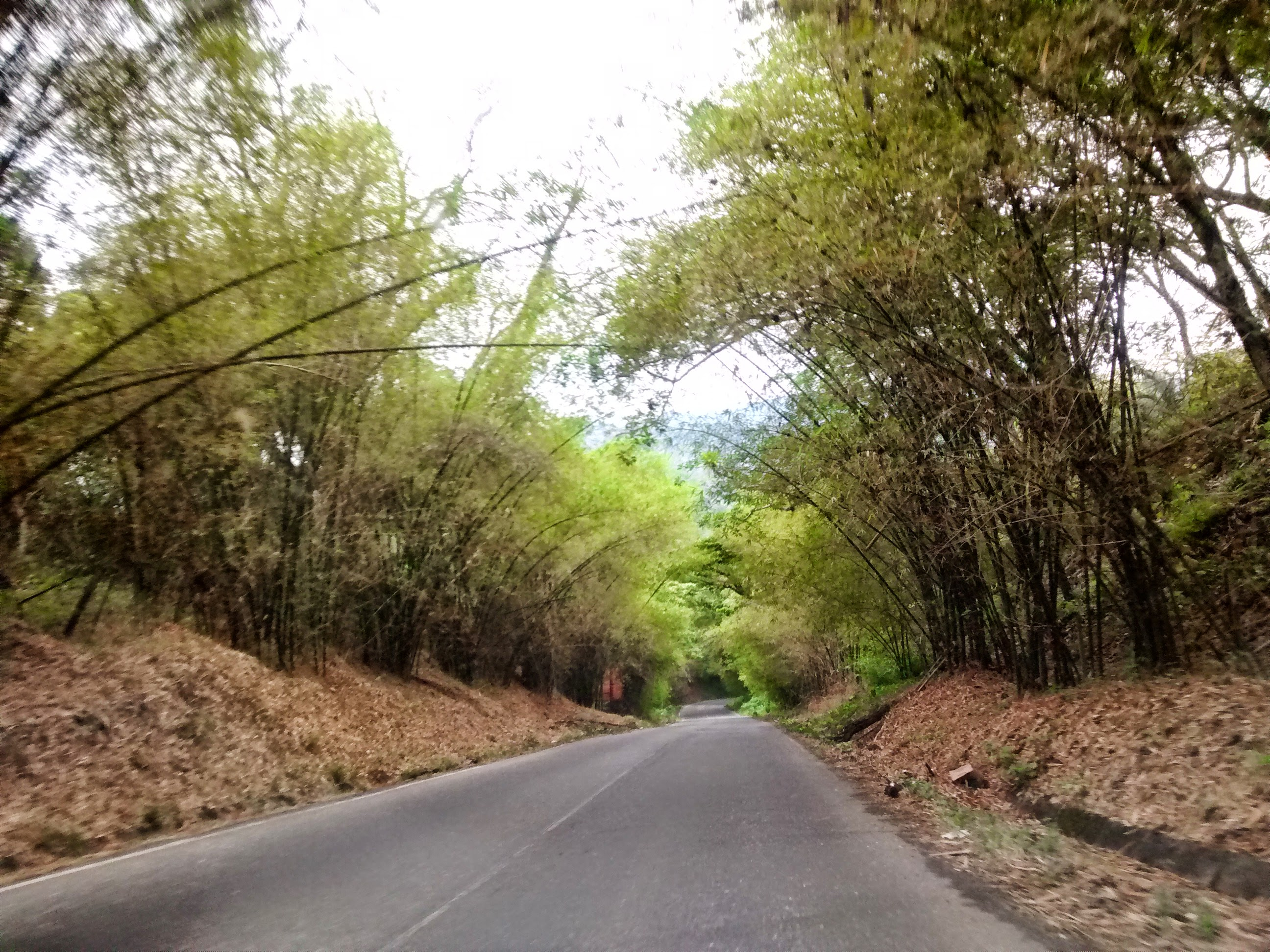 Semana santa